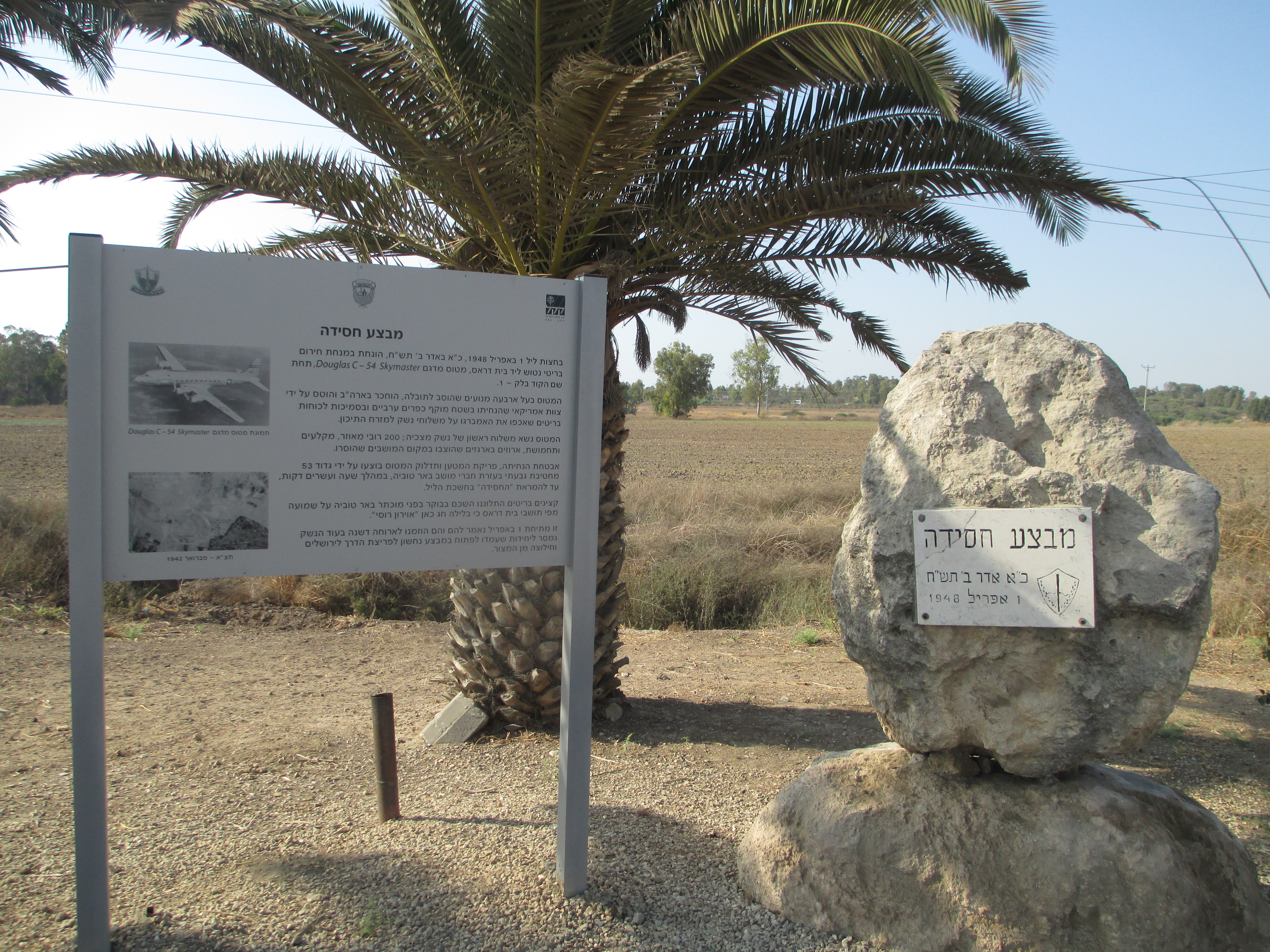 אתר מבצע חסידה בבאר טוביה